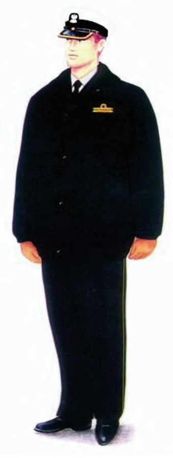 Ubiór galowy funkcjonariuszy noszących umundurowanie Marynarki Wojennej z kurtką zimową nieprzemakalną koloru czarnego z podpinką oraz z czapką garnizonową